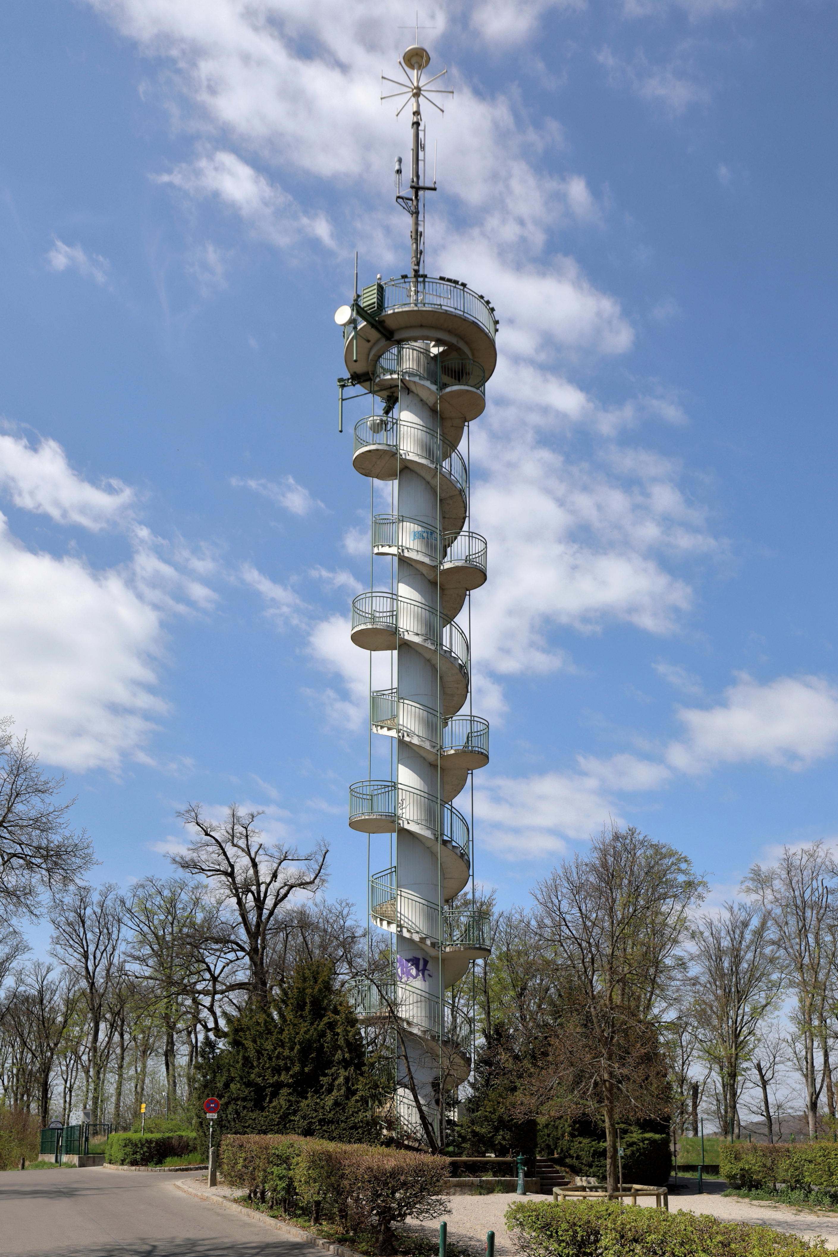 Ostansicht der Jubiläumswarte auf dem 449 Meter hohen Gallitzinberg im 16. Wiener Gemeindebezirk Ottakring.Die 31 m hohe Jubiläumswarte wurde anstelle einer baufälligen eisernen Warte (Abriss 1952) nach Pläne von Hermann Kutschera von der Gemeinde Wien errichtete und am 7. September 1956 eröffnet. Die Benennung wurde von der ursprünglichen Warte übernommen und diese bezog sich auf das 50-jährige Regierungsjubiläum von Kaiser Franz Joseph I.